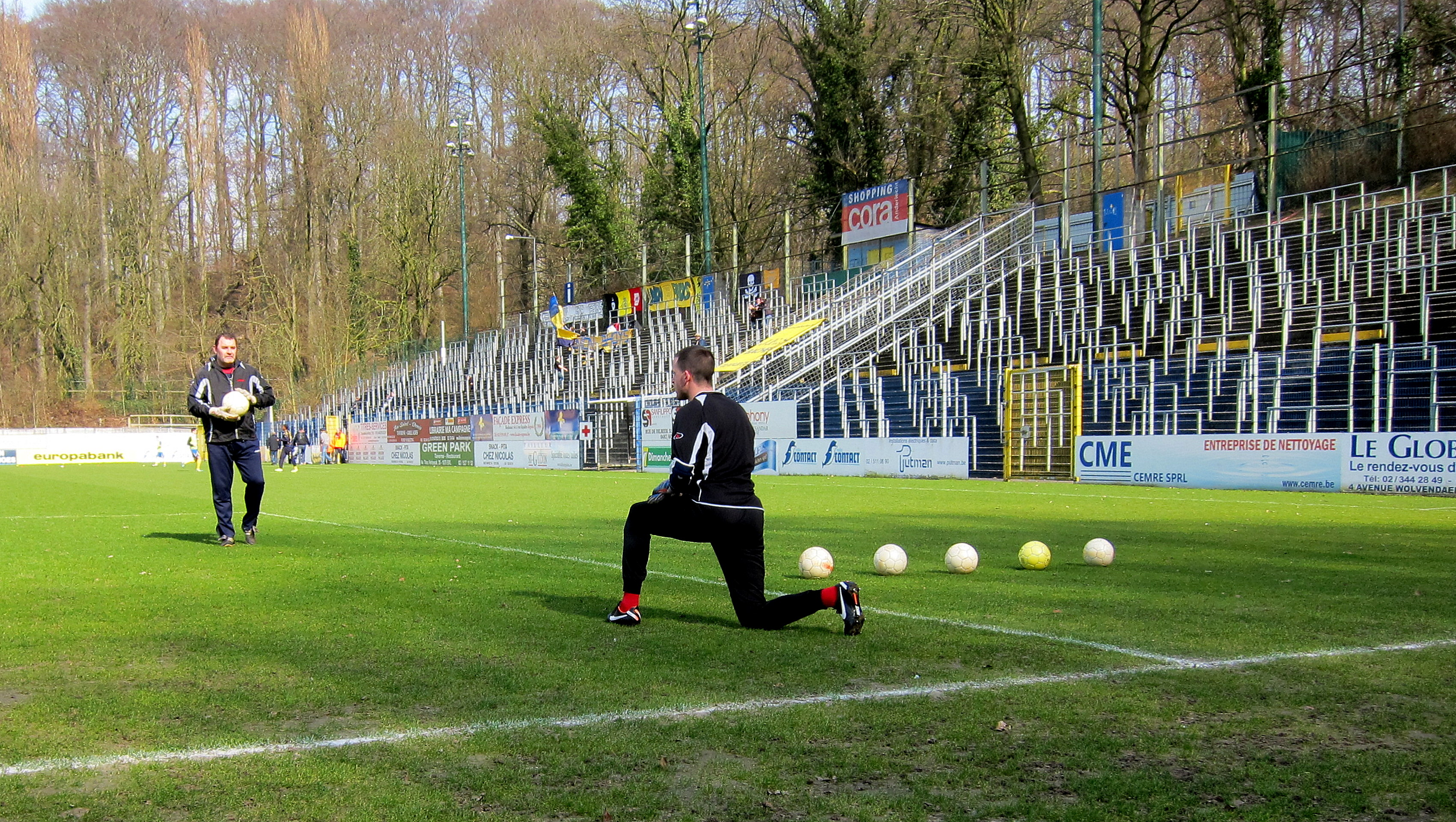 Het Joseph Marienstadion te Vorst, Brussel - stadion van Royale Union Saint-Gilloise